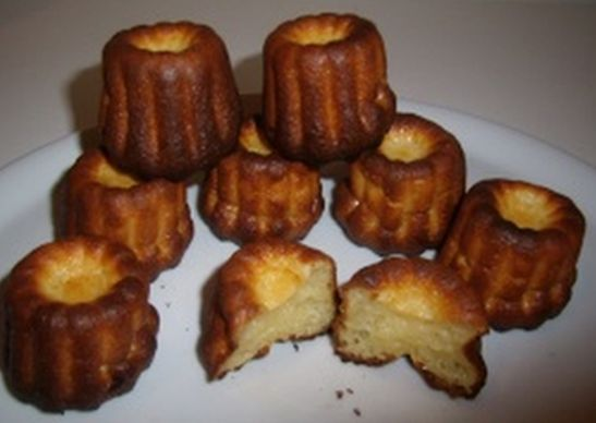 Acanalats casolans en un plat